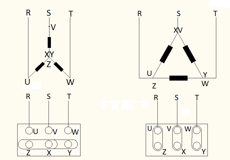 Disposición de una bornera para una conexión trifásica de tipo Estrella (Izquierda del espectador) y una de tipo Triangular (Derecha) respectivamente.